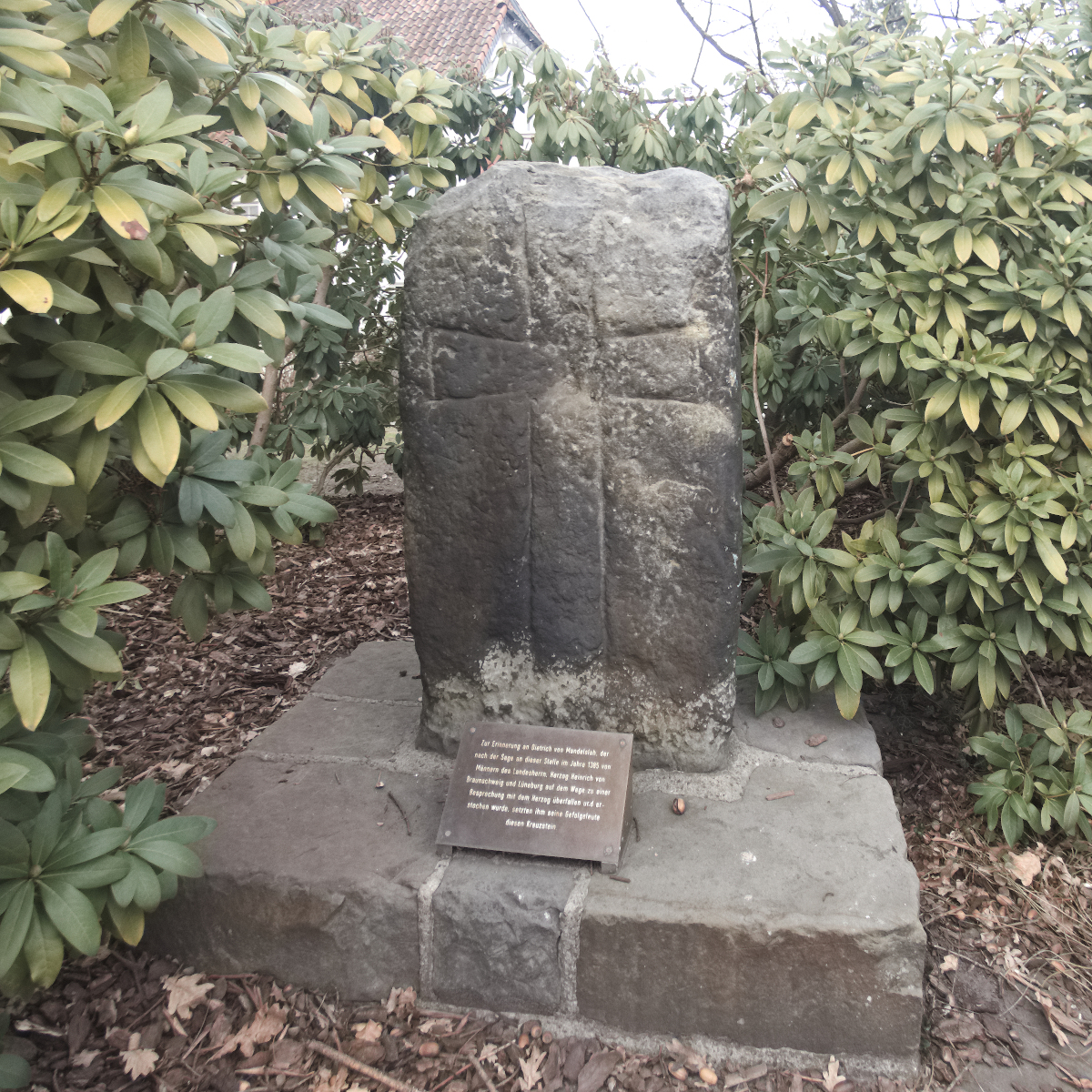 Kreuzstein im Seelzer Stadtteil Lohnde zur Erinnerung an Dietrich von Mandelsloh, der im Jahre 1395 von Herzog Heinrich von Braunschweig und Lüneburg auf dem Wege zu einer Besprechung mit dem Herzog überfallen und erstochen wurde